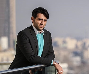 امیرحسین آرمان